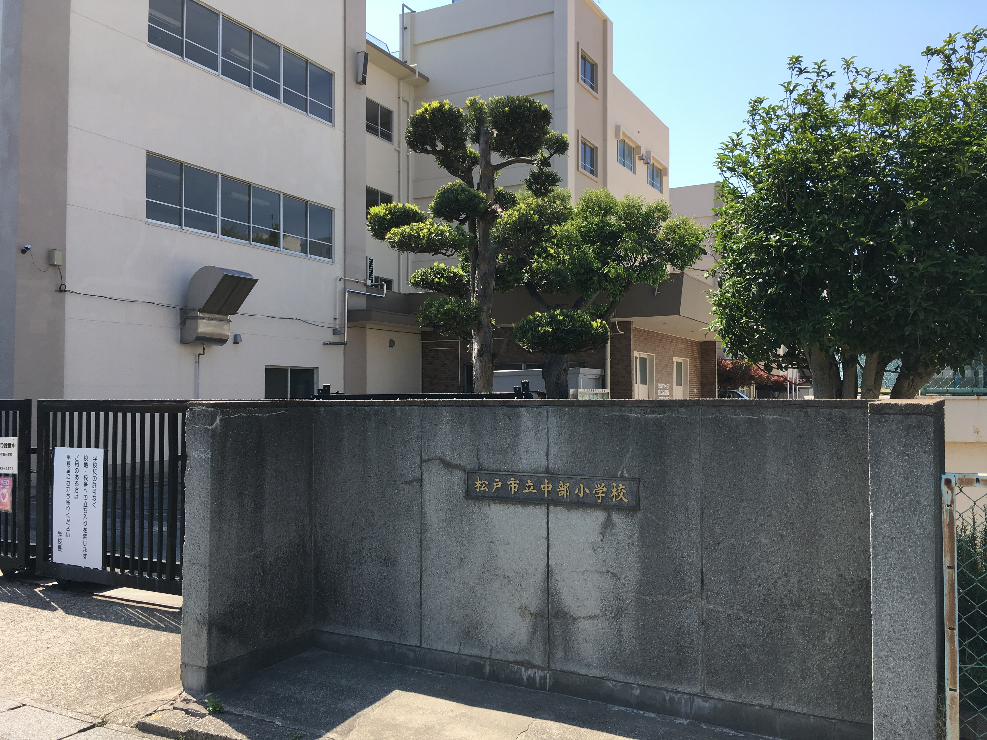 松戸市立中部小学校